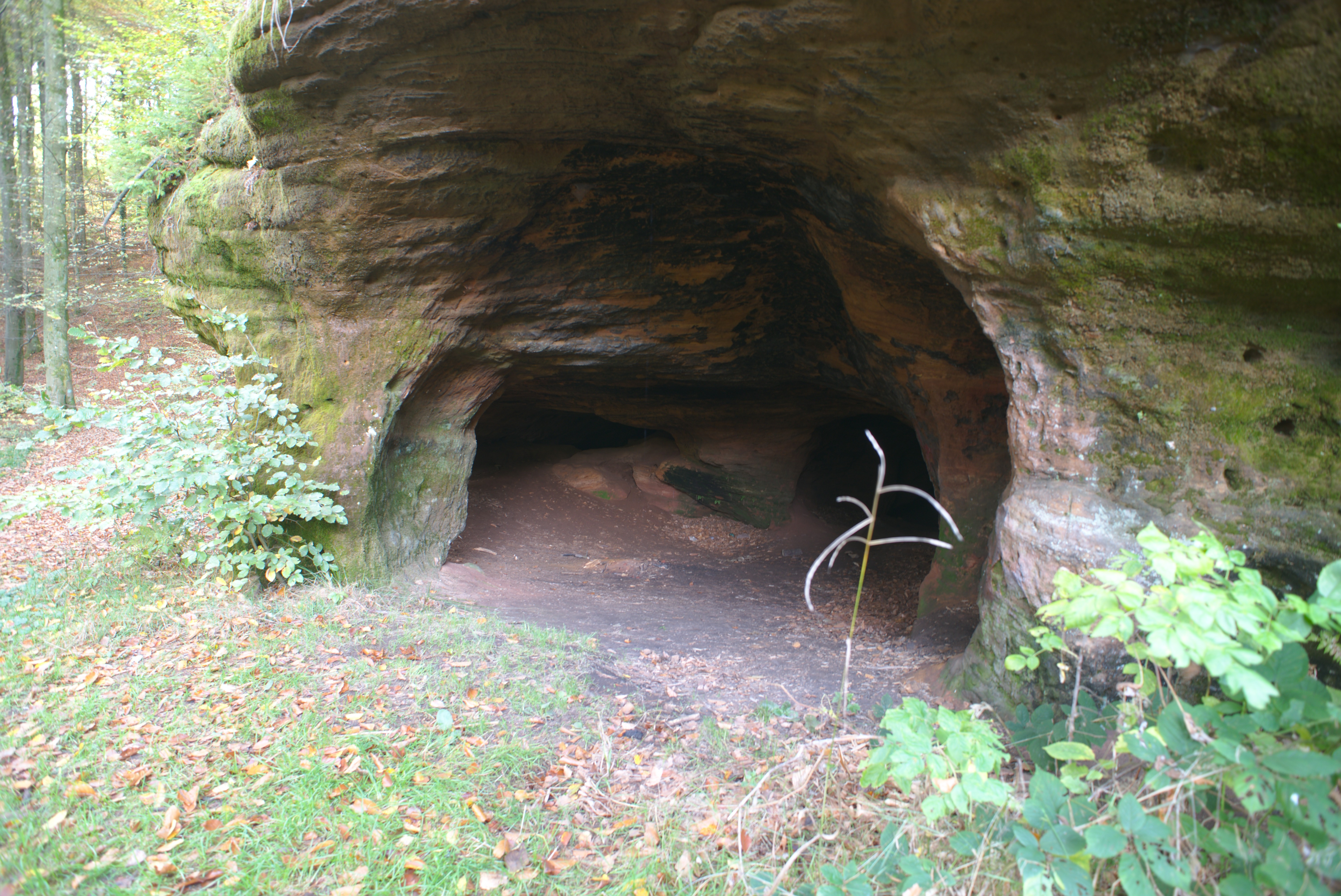 Untere Höhle des Eichertfelsen von außen.